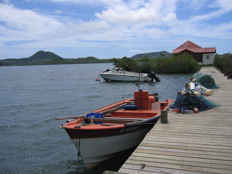 Les Tribulations Caribéennes de Nawal